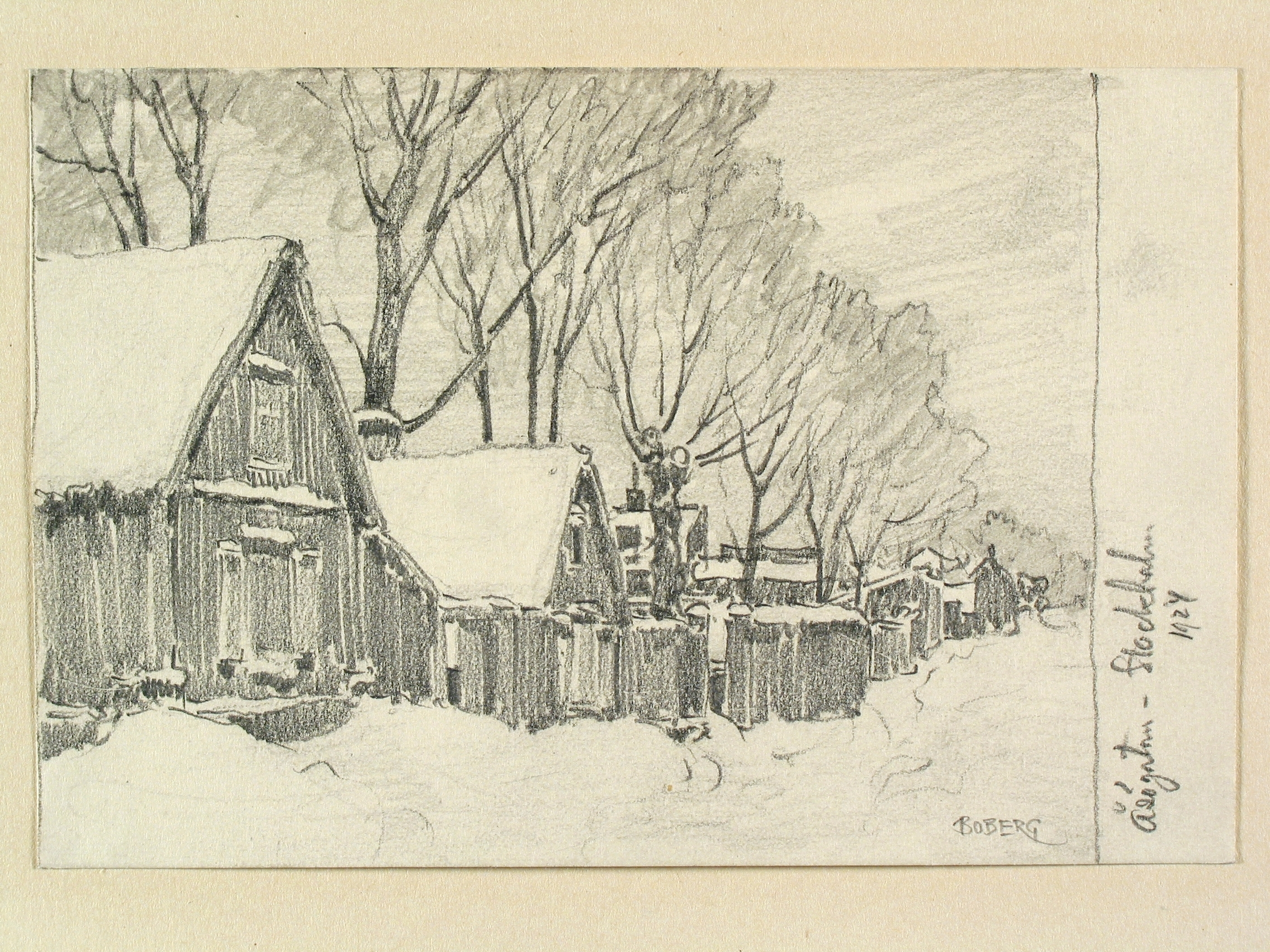 Stockholm, Södermalm, Åsögatan.Teckning av Ferdinand Boberg. Depicted place: Söder, Åsögatan (Ortnamn därutöver), Stockholm County (Q104231)